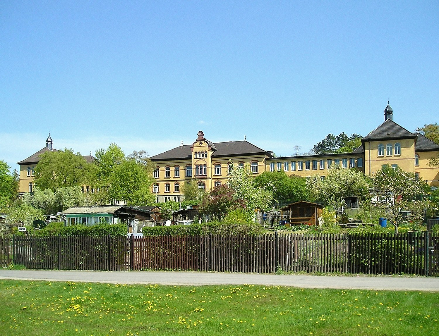 Das „Georgenkrankenhaus“ in Meiningen - heute die geriatrische Fachklinik „Georgenhaus“